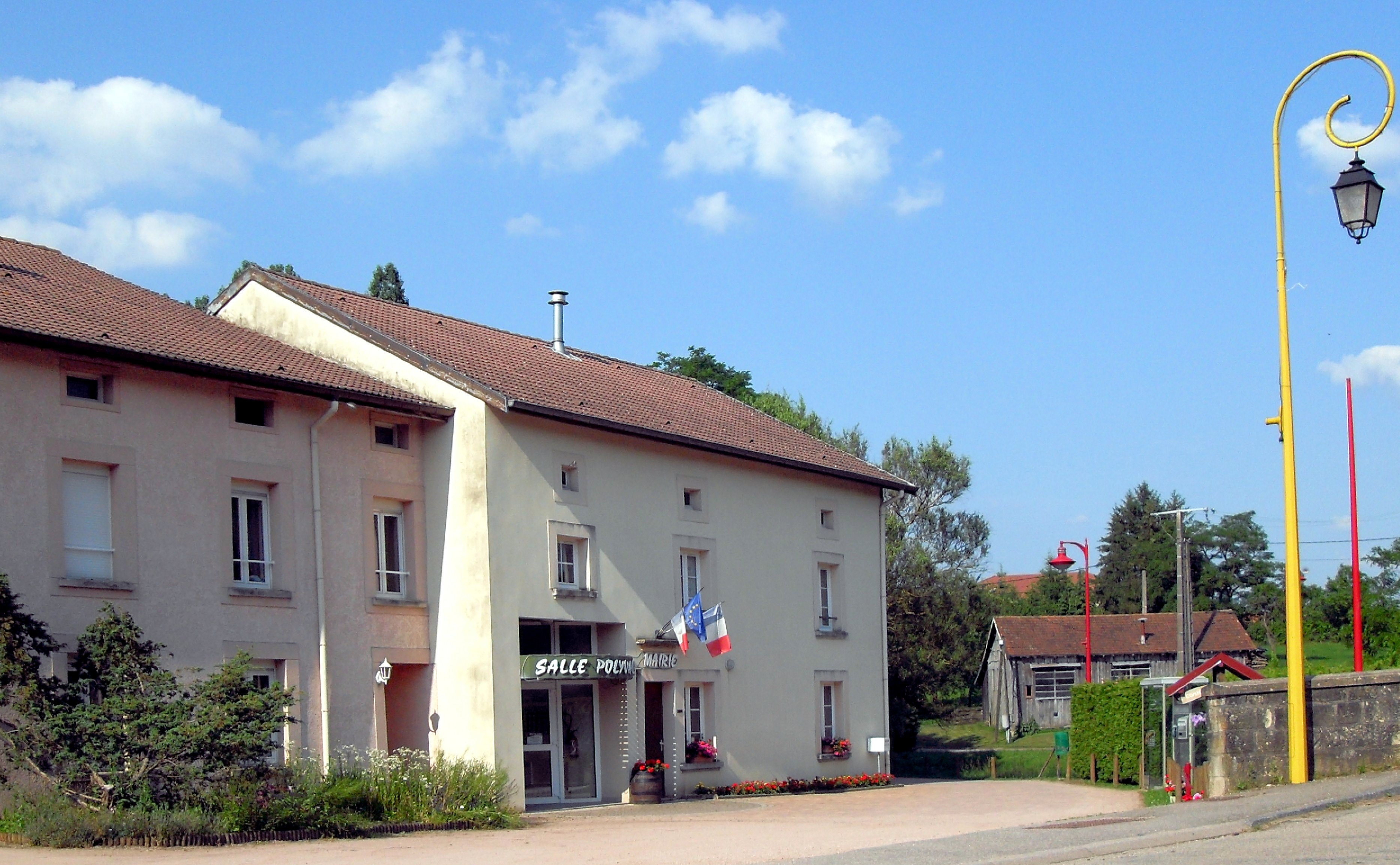 La mairie-école de Bayecourt